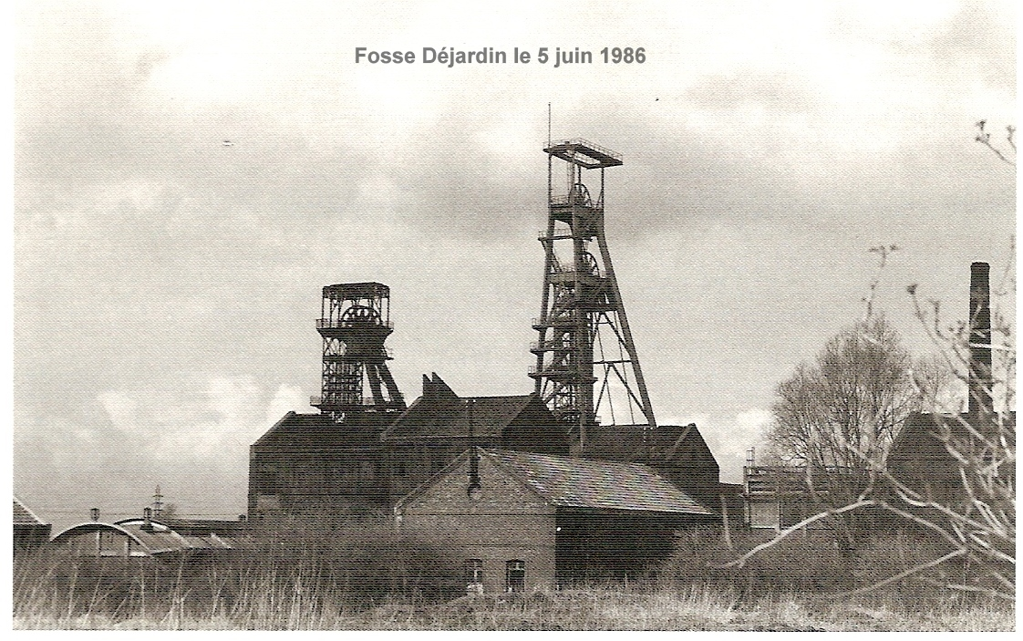 Fosse Déjardin de l'Ancienne Cie des mines d'Aniche